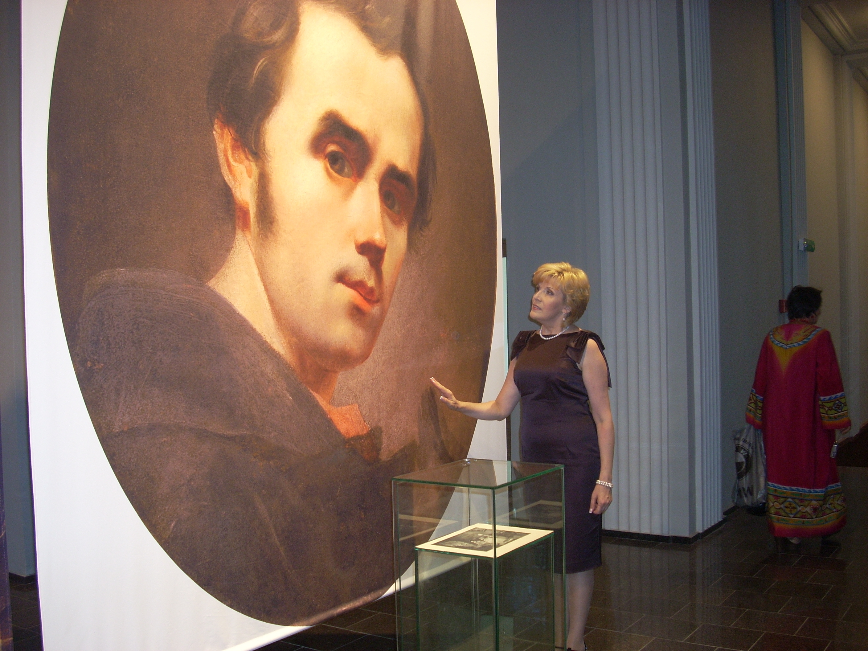 Христина Стебельська у Музеї Тараса Шевченка у Каневі